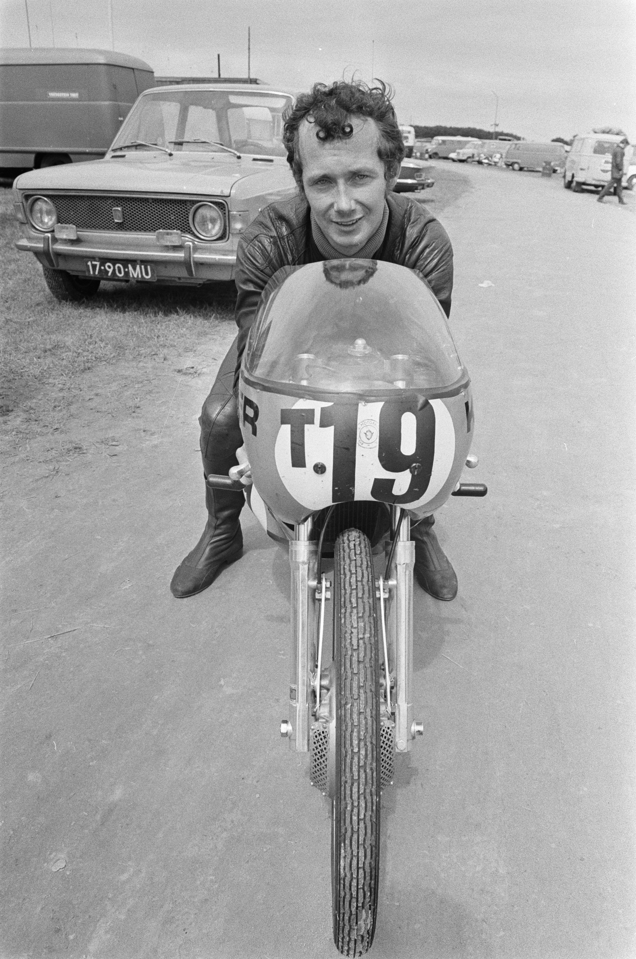 Jan de Vries op 50cc motor (Van Veen Kreidler). Assen